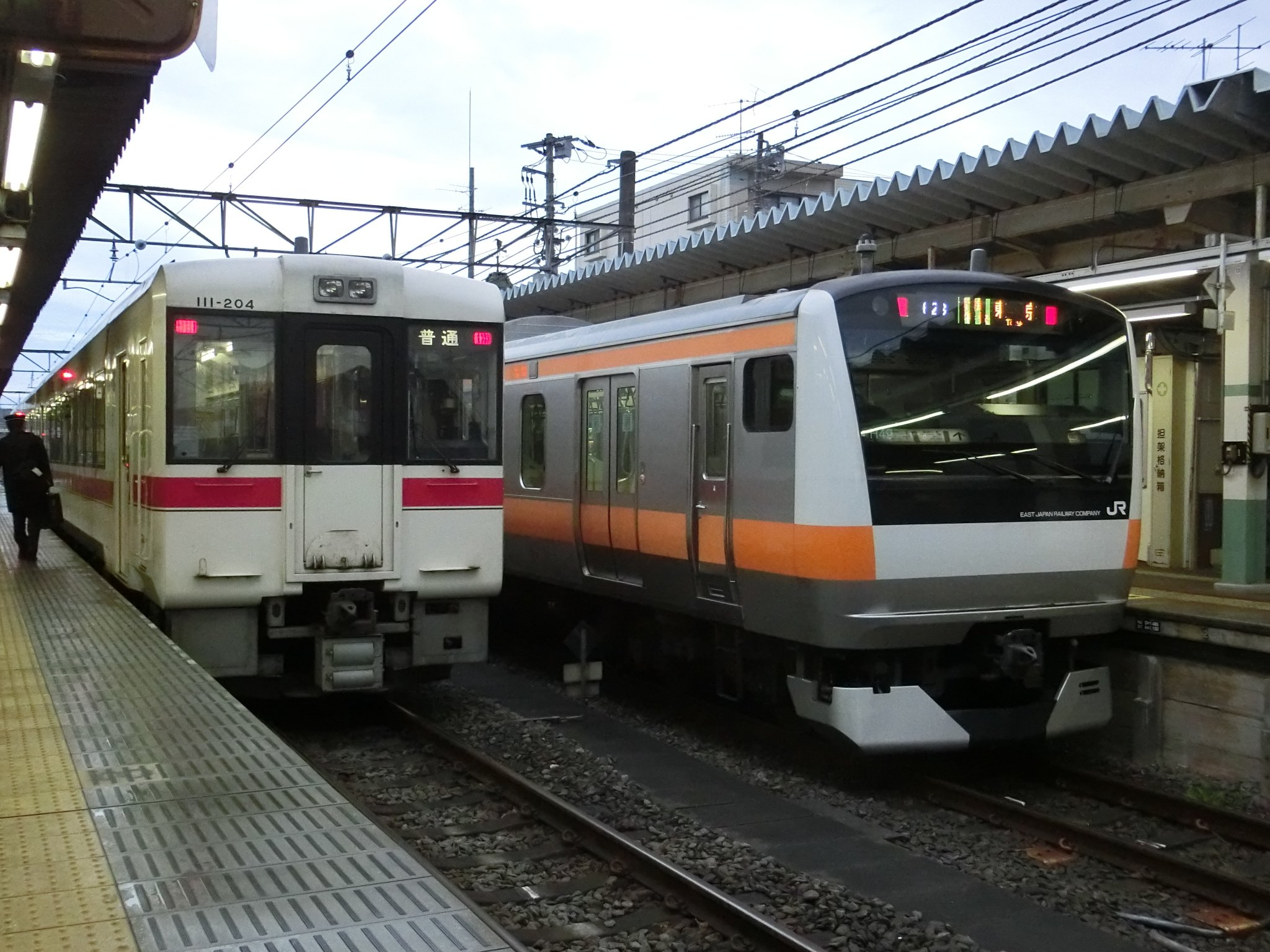 E233系0番台トタH49 & キハ110系200番台204 @八高線高麗川駅